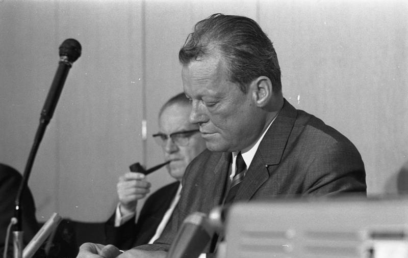 Pressekonferenz der SPD im Fraktionssaal der SPD (Bundeshaus)